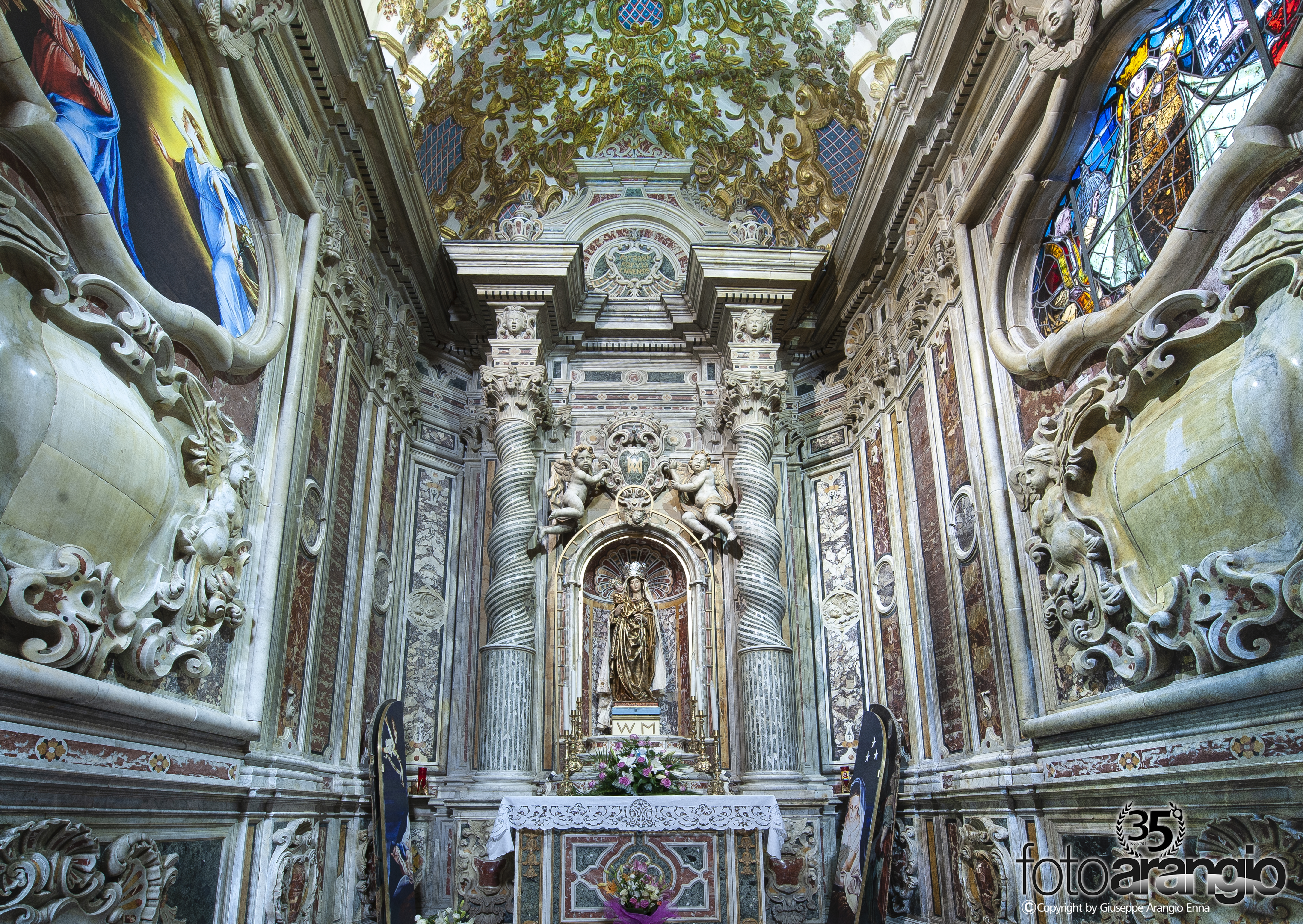 Cappella dei Marmi, posta sul lato destro del Duomo , in stile barocca, dove viene posta la Patrona del Popolo Ennese.